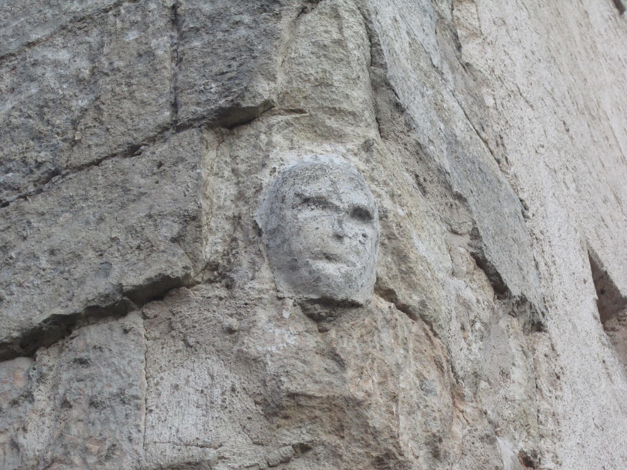 Maschera apotropaica contro il maloccio. Campanile di Pedace